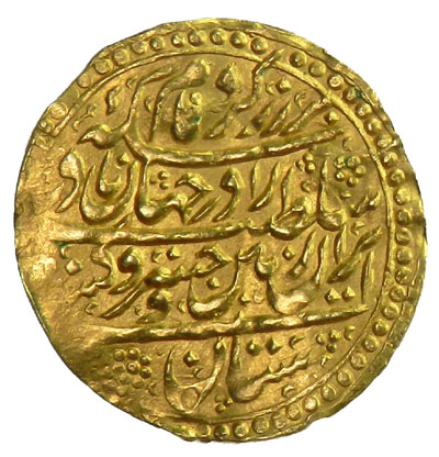 Nader´s Münze, Auflage in Isfahan, auf Münze ist sein offizieller Titel geschrieben: Nader König von Iran, Khosrow (alter Titel der iranischen Könige) Eroberer der Erde